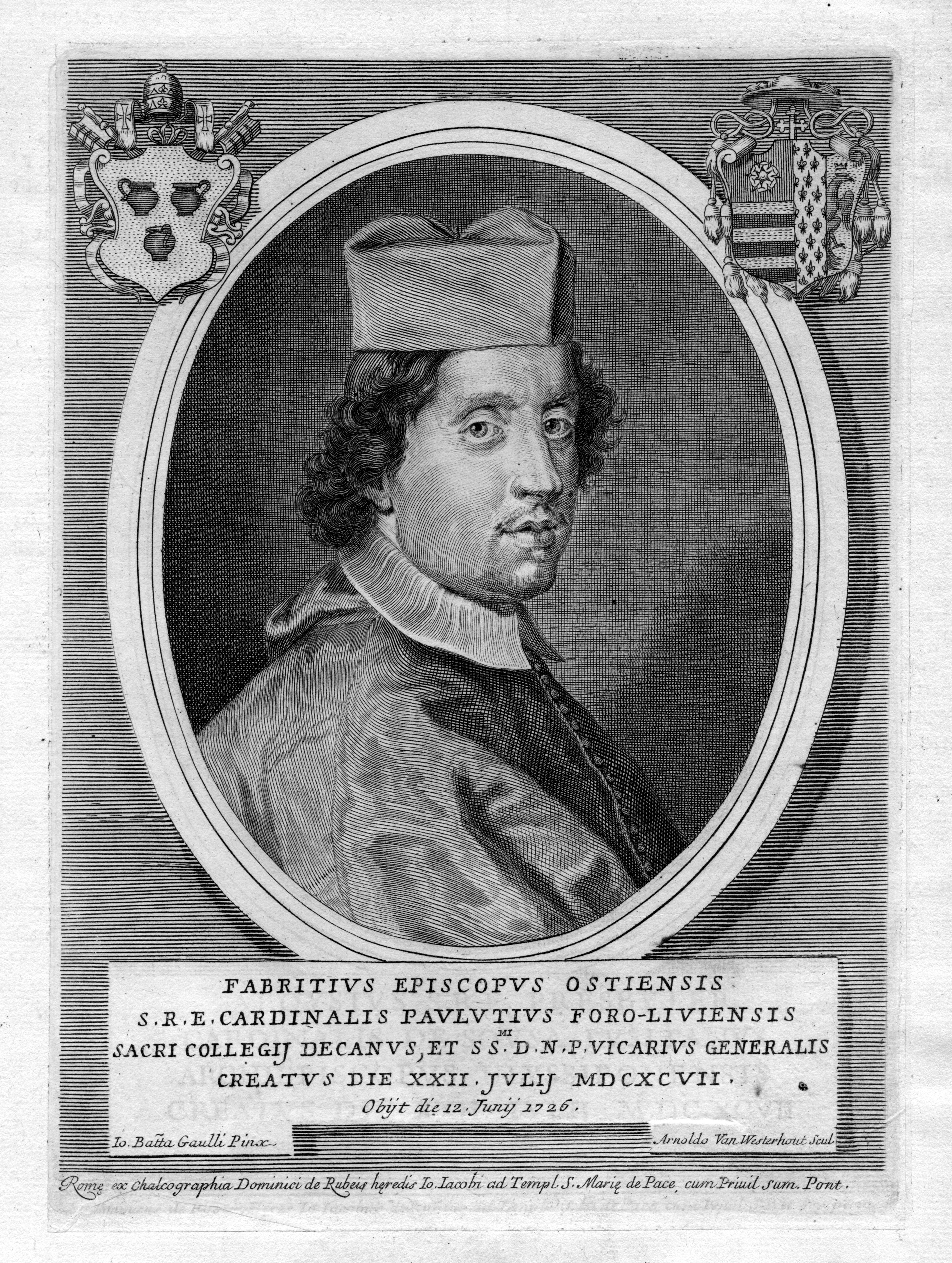 Cardeal Fabrizio Paolucci